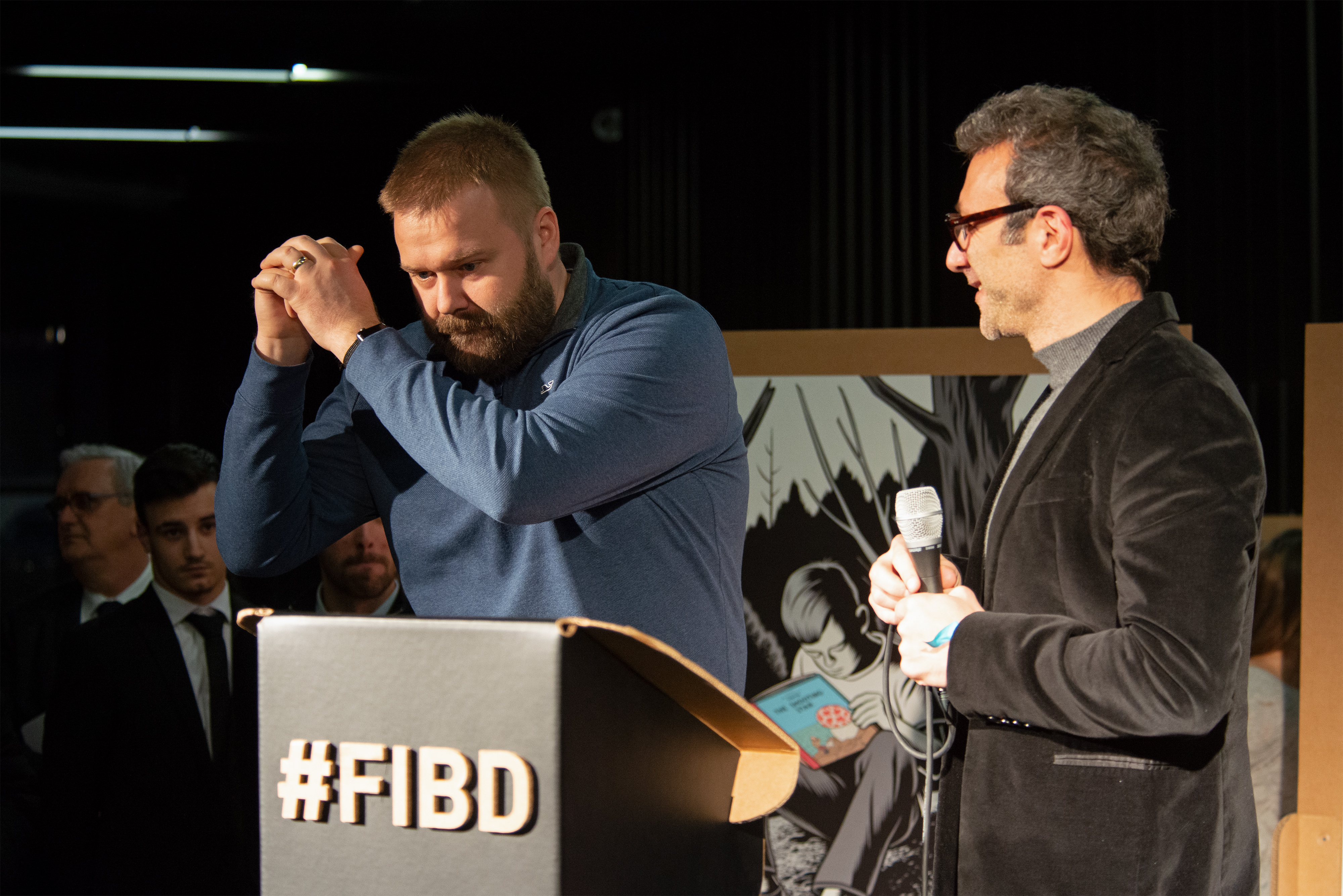 Remise d'un Fauve d'honneur au scénariste américain Robert Kirkman au Festival International de la Bande Dessinée d'Angoulême 2020.